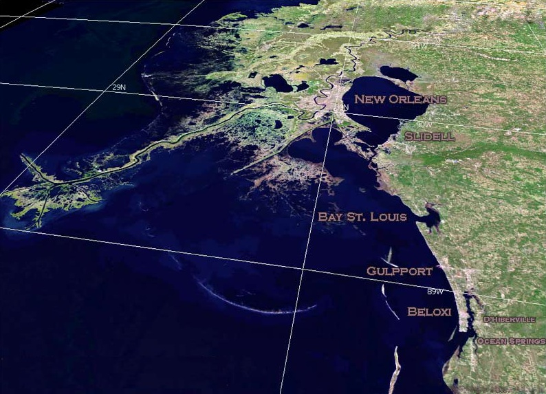 Satellietfoto New Orleans - Beloxi